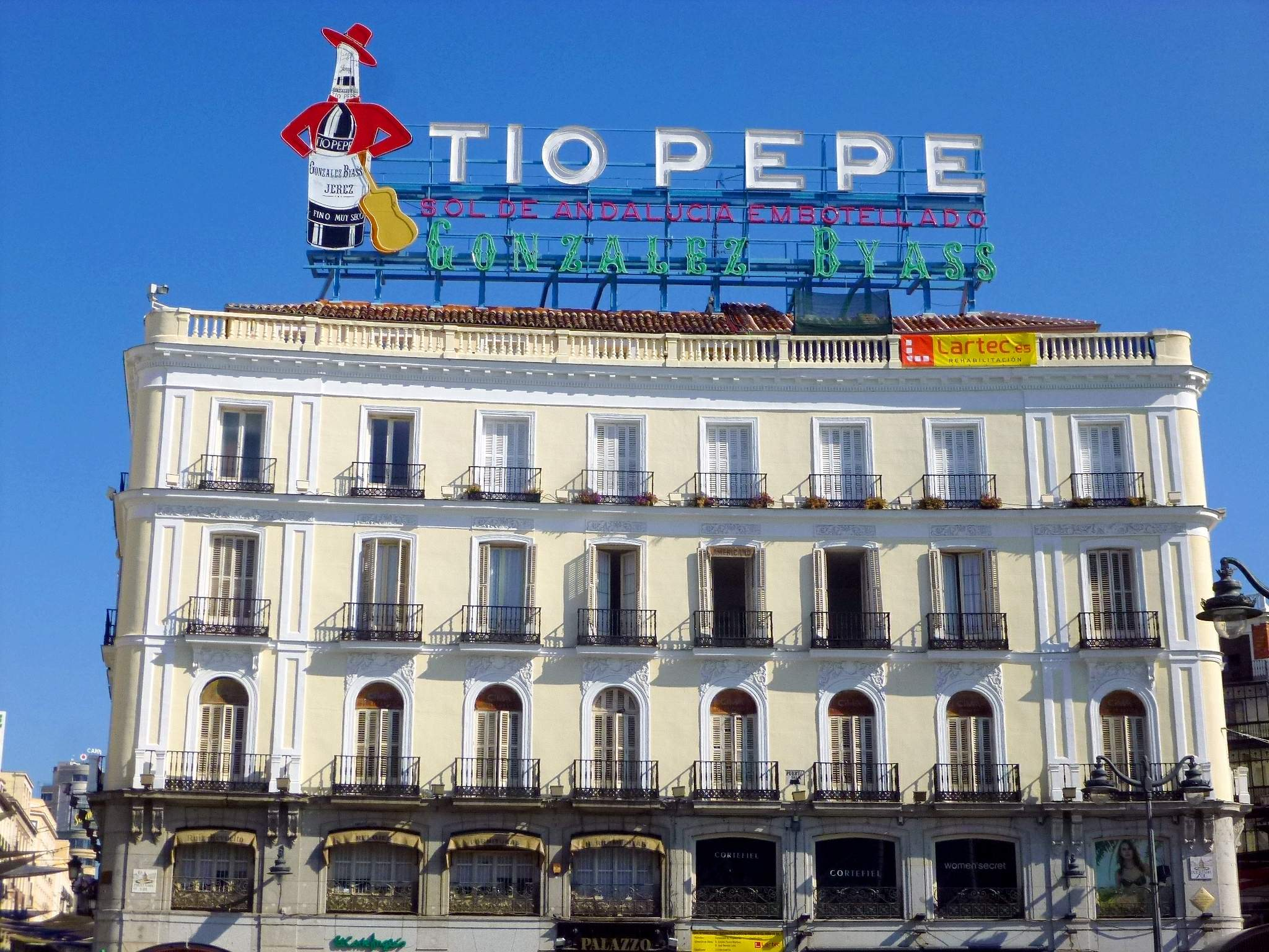 Madrid - Puerta del Sol, Tío Pepe